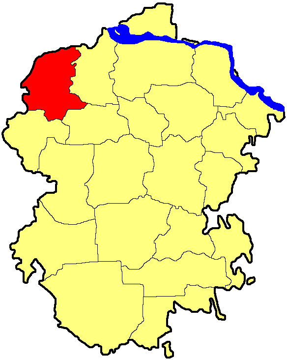 Ядрінський район Чувашії